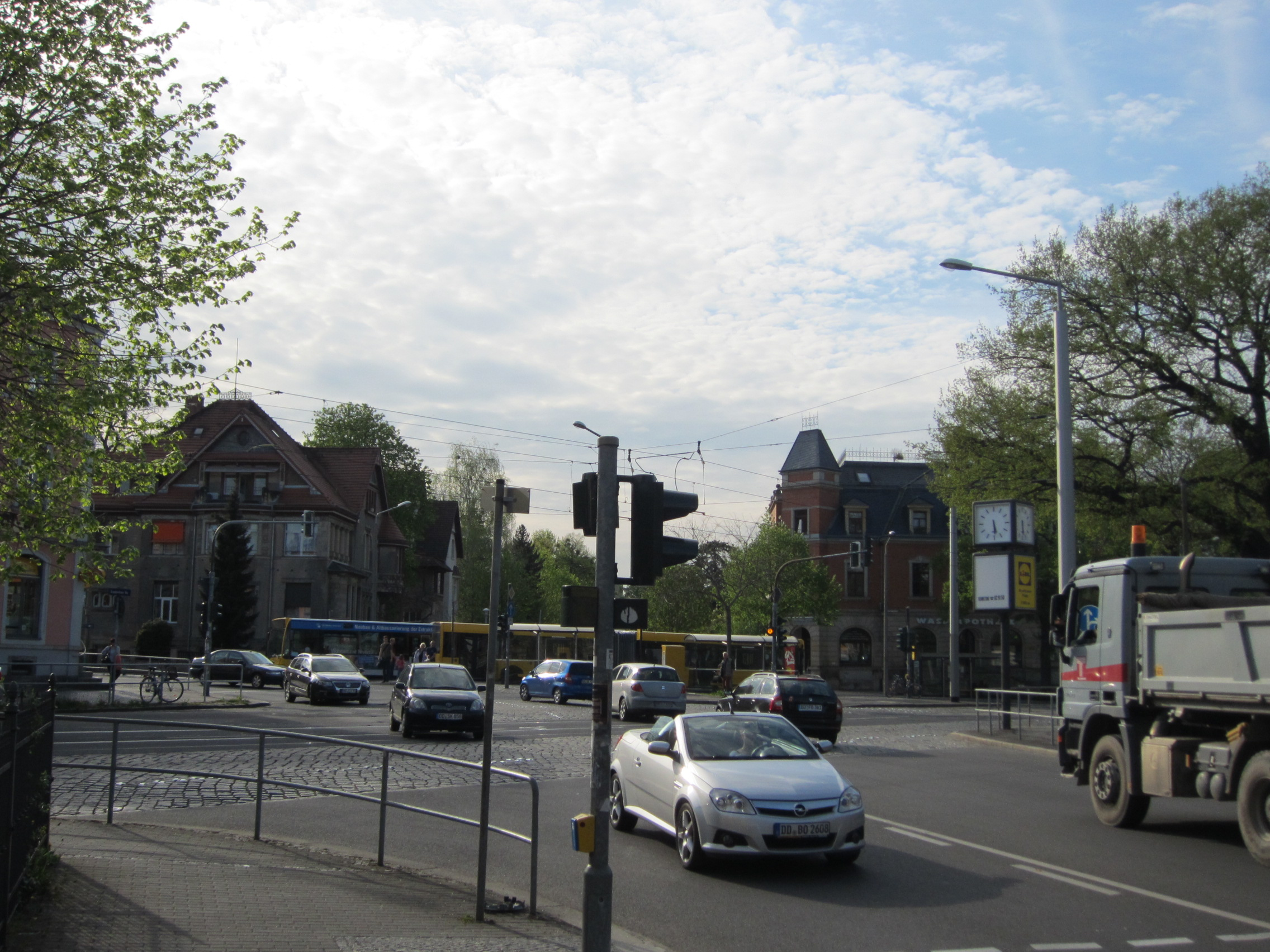 Der Wasaplatz in Dresden-Strehlen von Süd-Osten